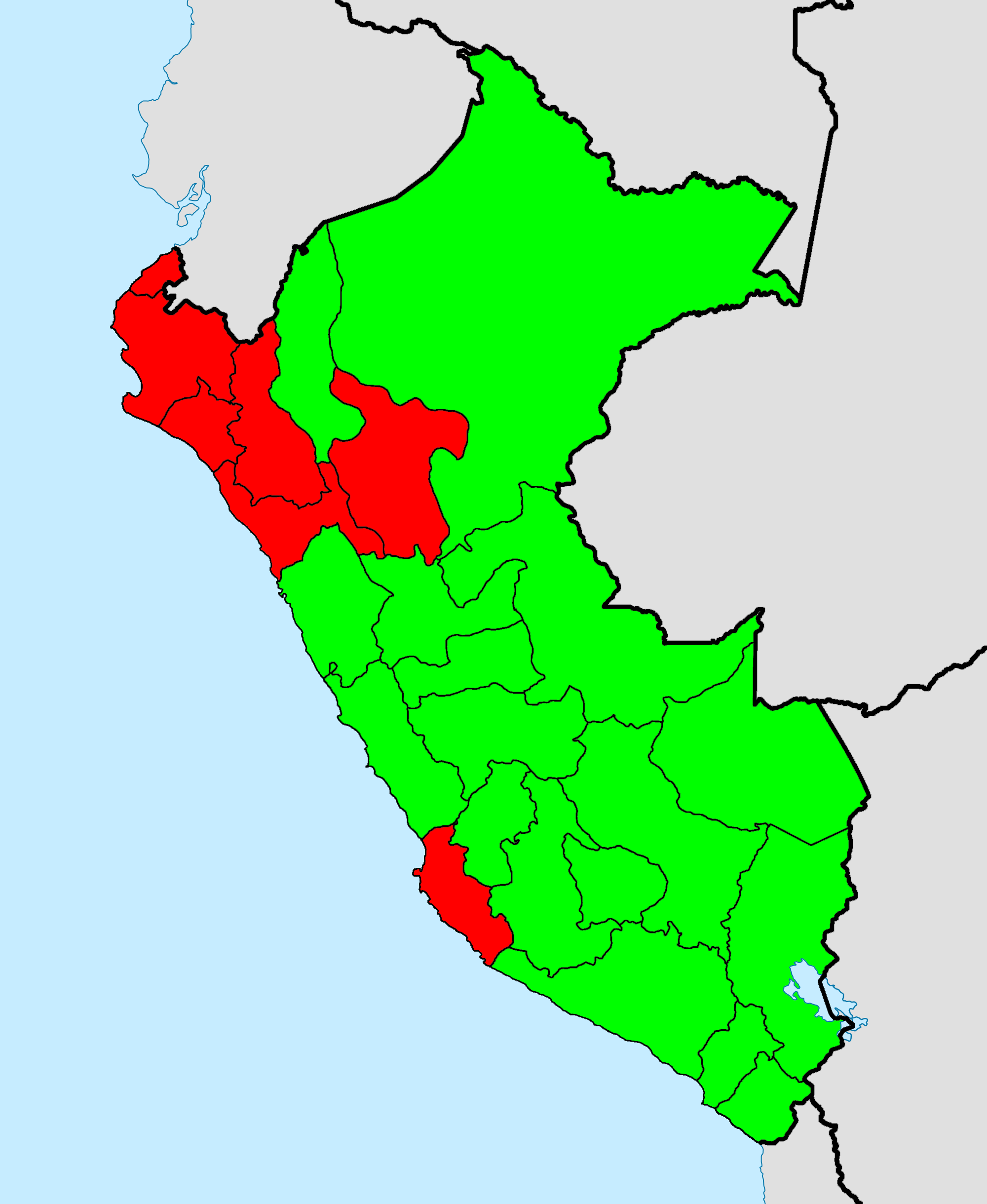 Candidato vencedor por departamento: en verde Peru Posible, en rojo APRA, según